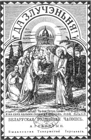 Да злучэння (газета)